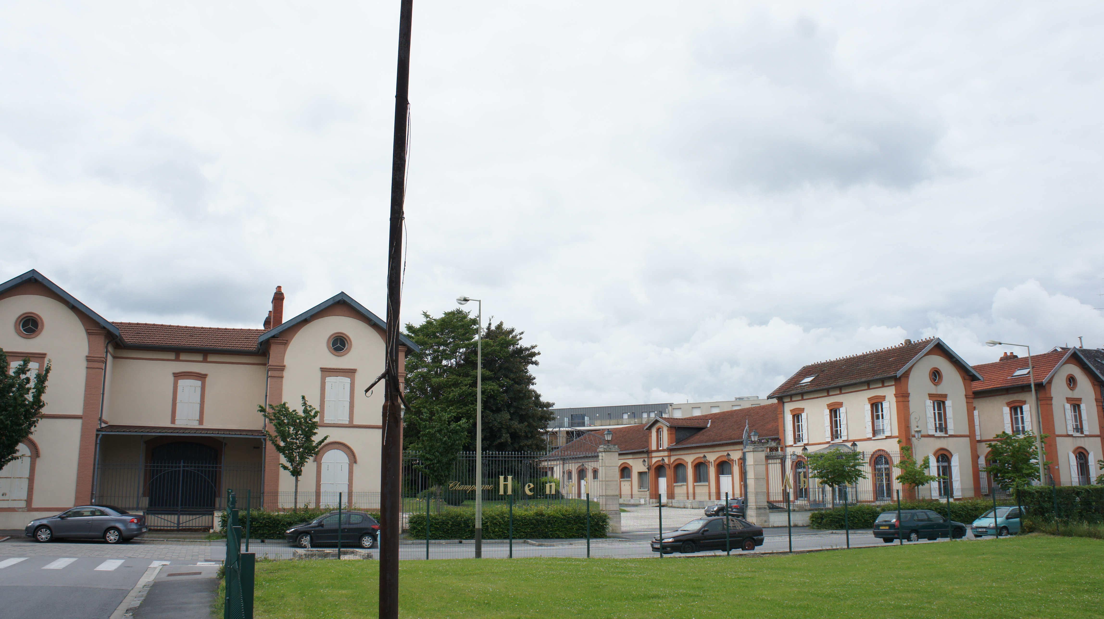 La maison Champagne Abelé rue de Rilly à Reims .